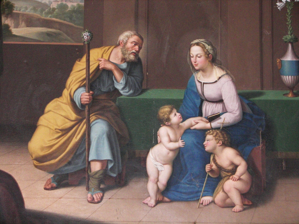 Sacra Famiglia, Olio su tela del 1841, Giuseppe Rapisardi. Chiesa Madre di Santa Maria di Licodia